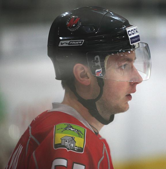 Нападающий новокузнецкого «Металлурга» Константин Турукин во время матча чемпионата КХЛ против астанинского «Барыса» 7 января 2013 года.